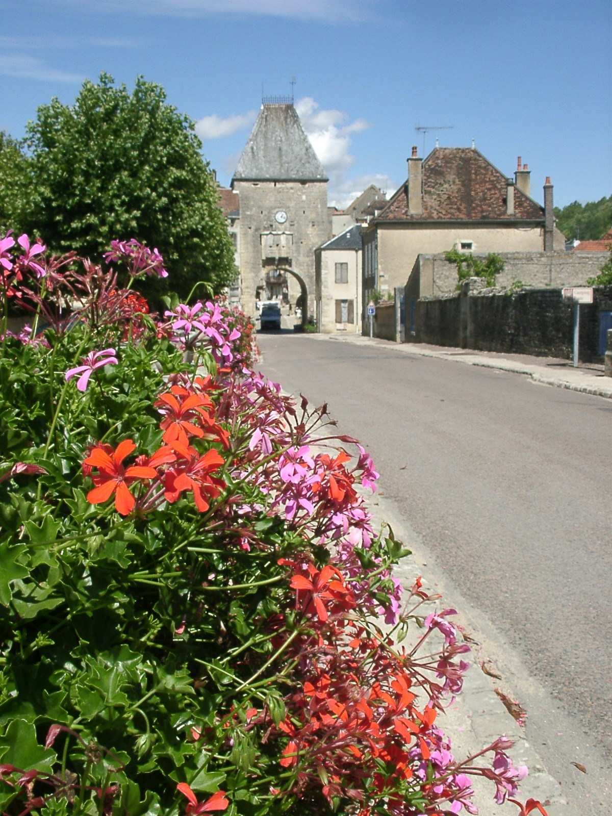 Porte fortifiée de Noyers-sur-Serein : la Porte Peinte -août 2006 -photo personnelle -Henri JACHET